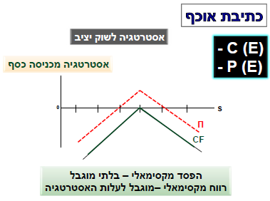 מכירת אוכף